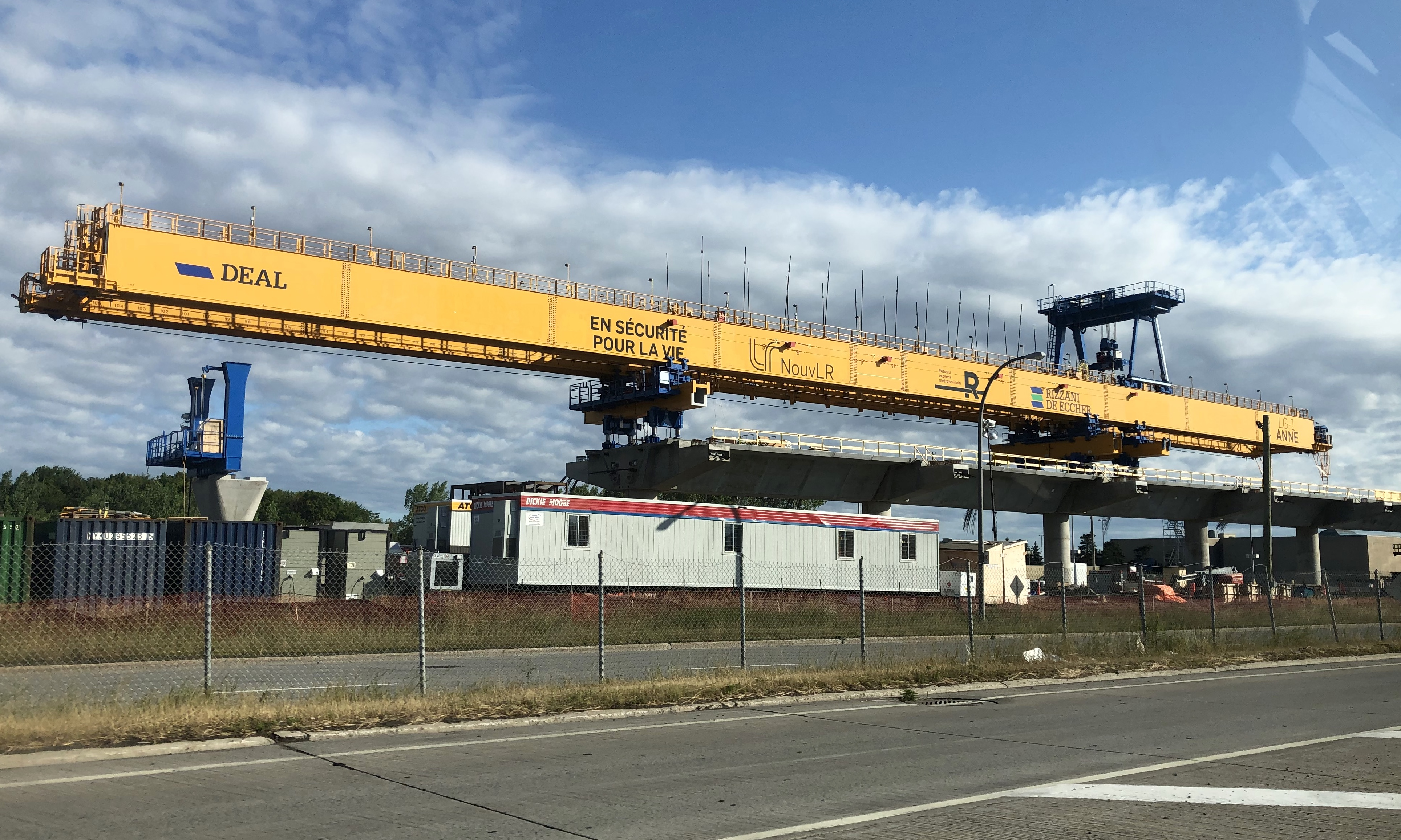 Poutre de lancement LG-1 Anne utilisée pour assembler le viaduc ferroviaire du REM le long de l'autoroute 40 (transcanadienne).